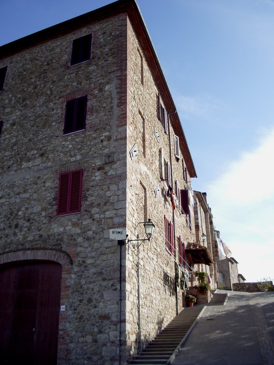 Lato sud-occidentale della cerchia muraria di Pari (GR)